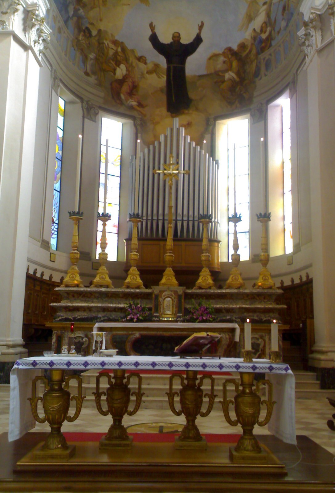 Chiesa di San Giuseppe da Copertino